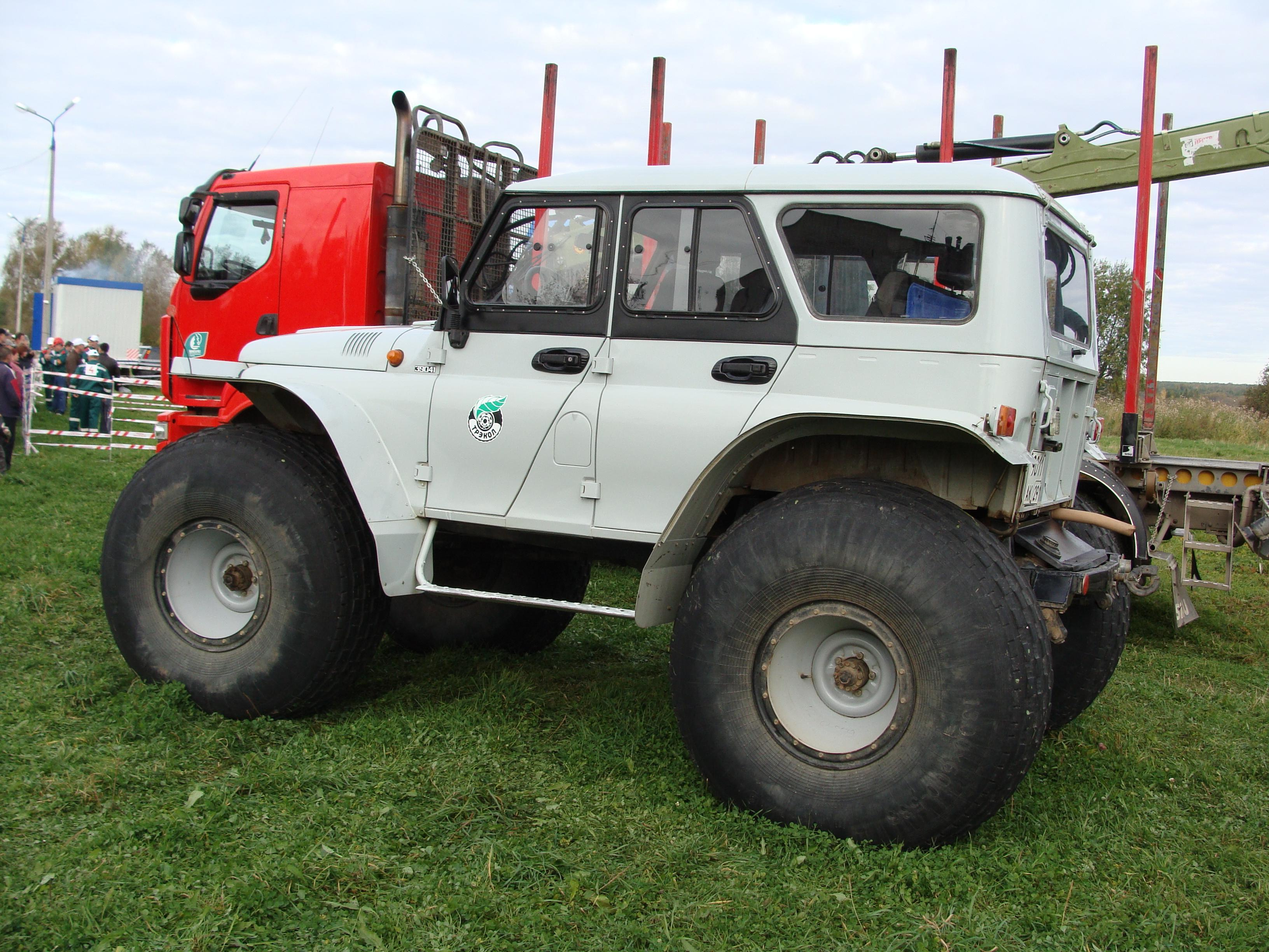 День работников леса. Коряжма 2009